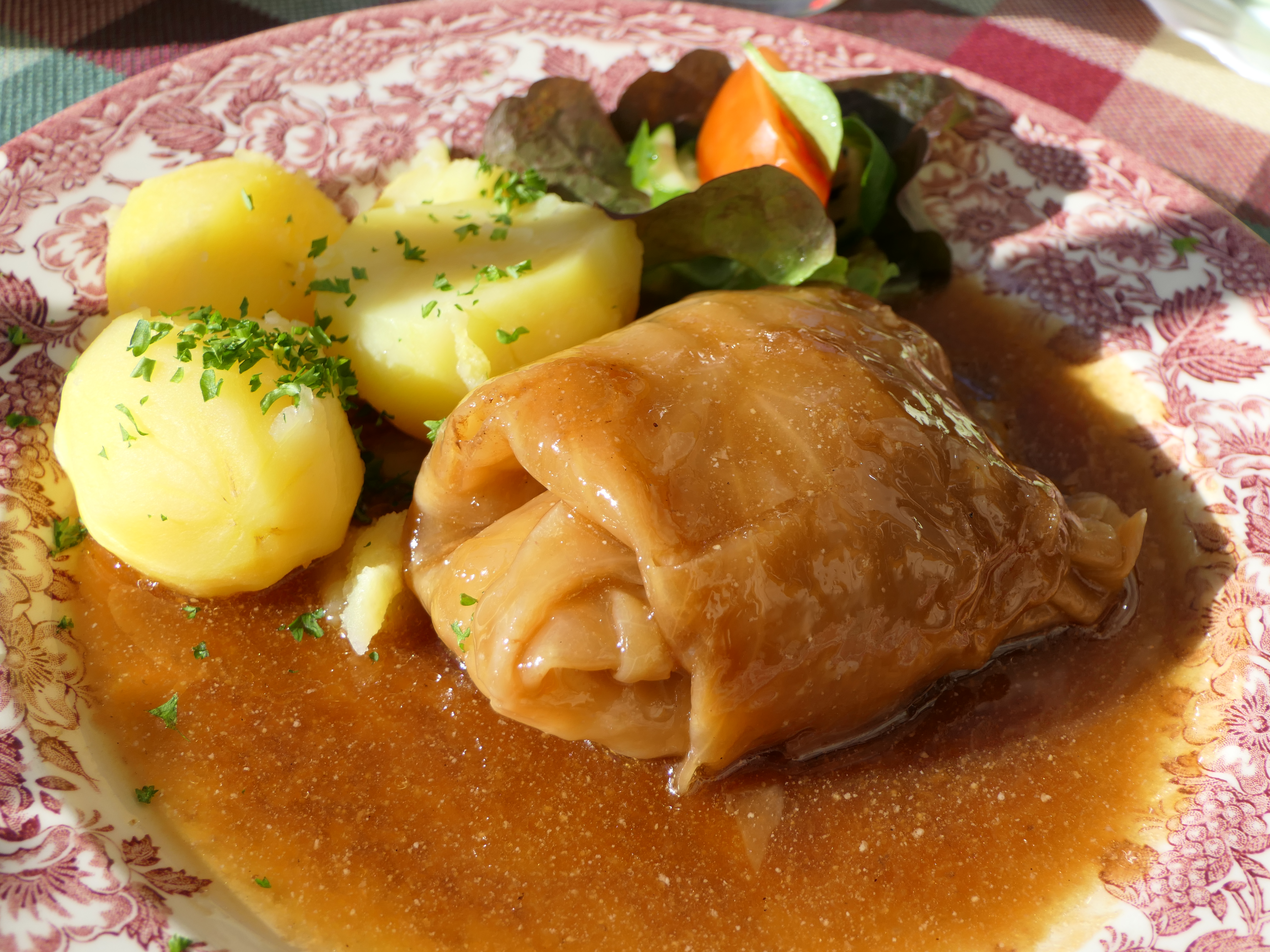 Kohlroulade - Gericht im Gasthof "Zum Auer" in Moritzburg